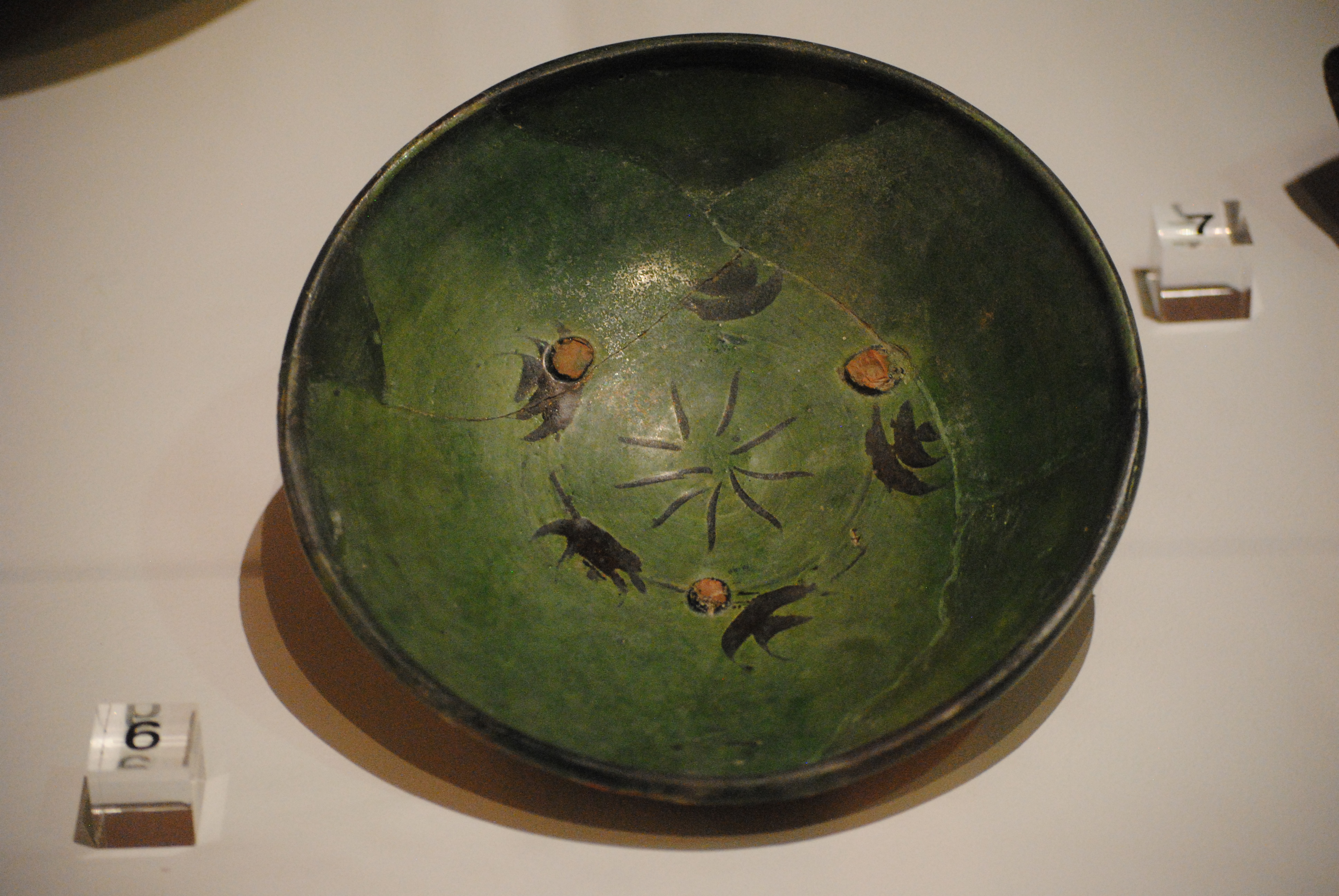 Ciotola ingobbia e graffita a stecca fabbricata a Pisa tra la fine del XVI - inizi del XVII secolo (recuperata durante gli scavi presso il lungarno Simonelli, Pisa) - Museo nazionale di San Matteo.